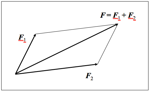 Bi indarren erresultantea lortzeko erregelaren eskema.